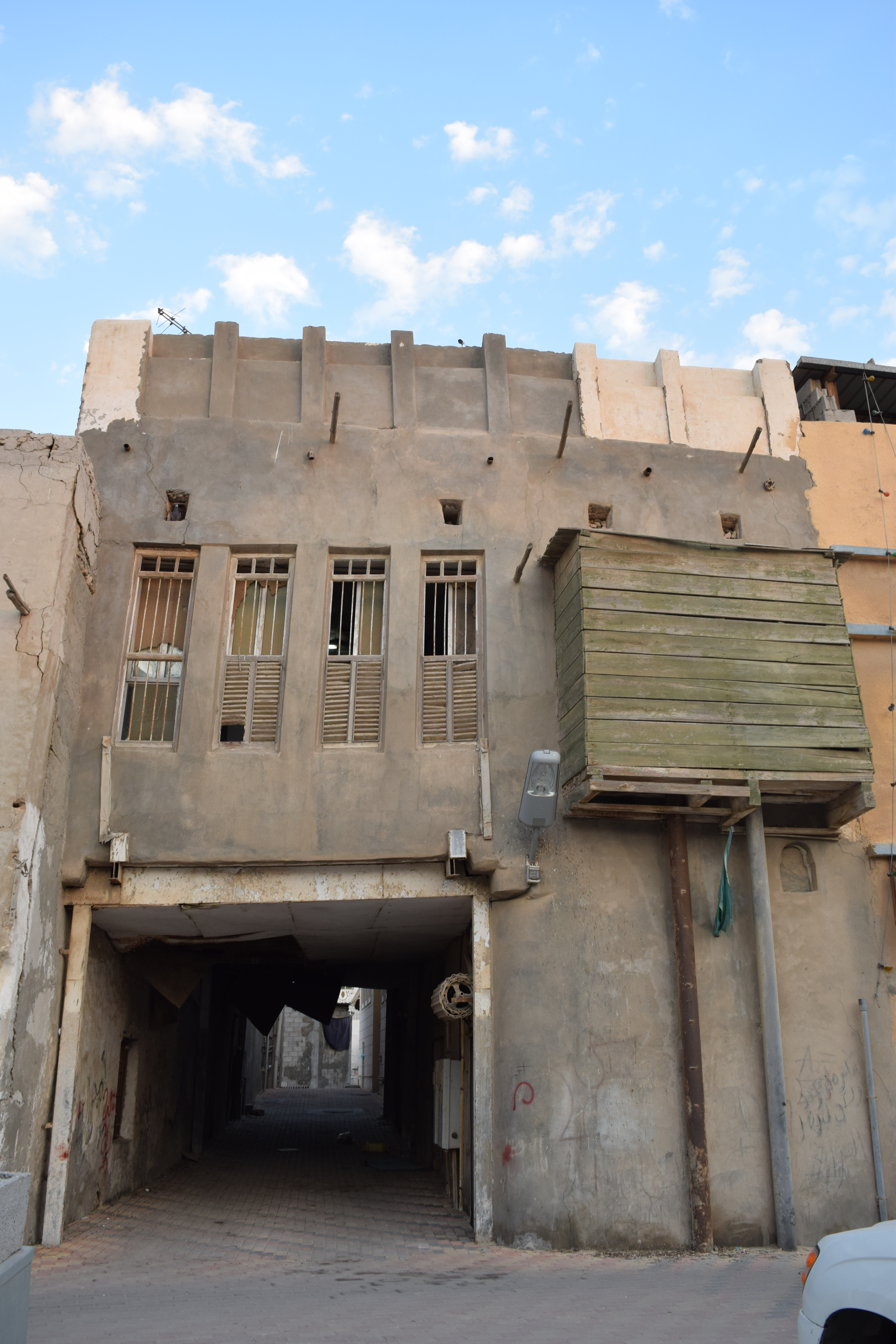 ممرات مسقفة وتسمى الساباط، تشتهر مُعظم القرى الأثرية في القطيف بها.